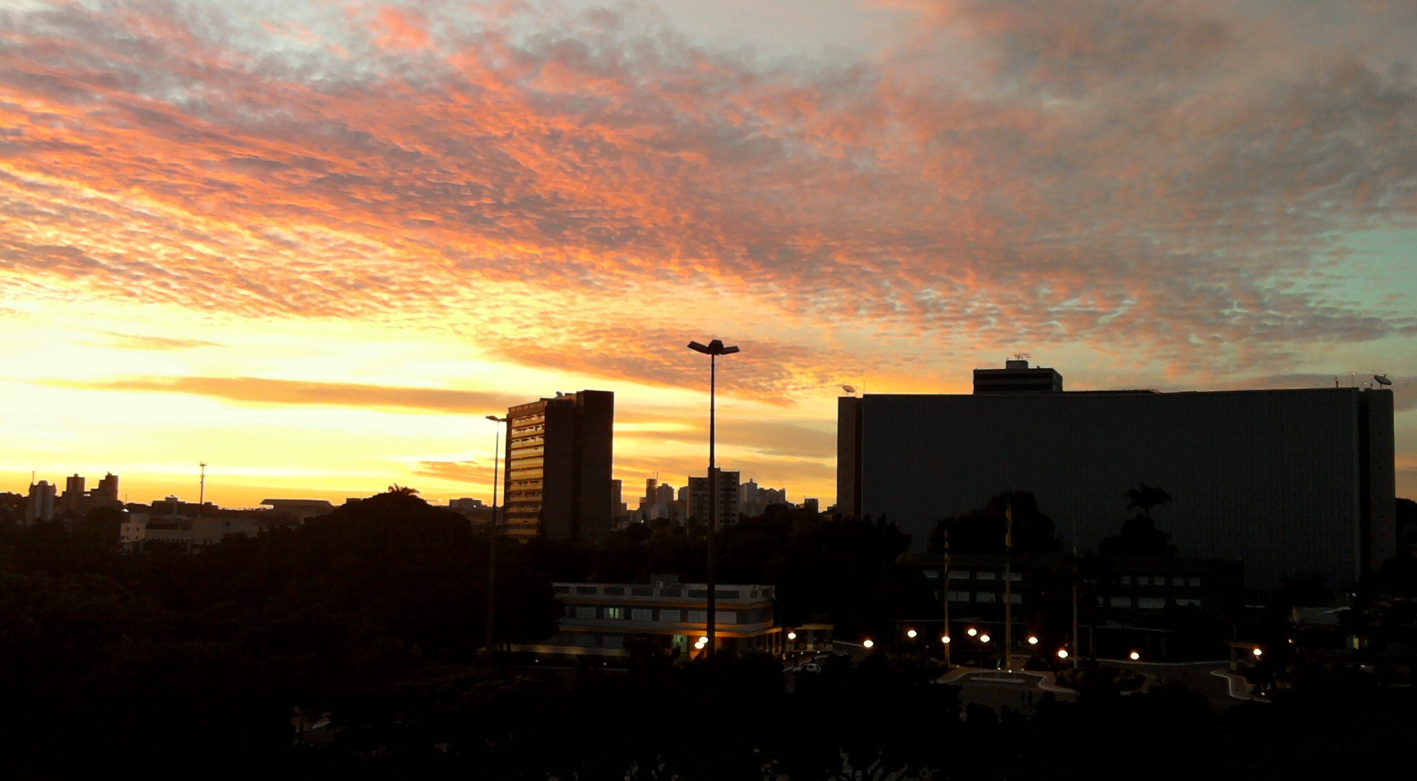 Praça Cívica - Goiânia - Goiás - Brasil